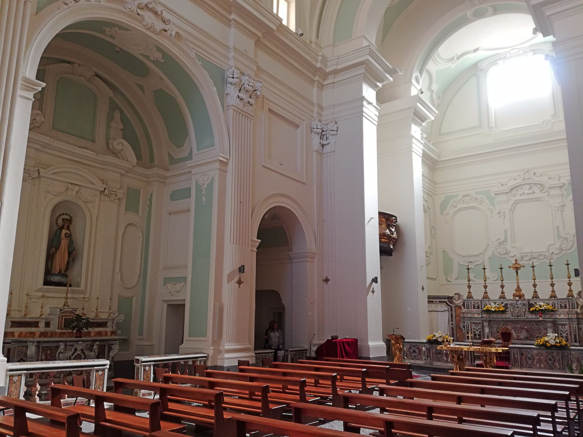 Chiesa di San Carlo alle Mortelle